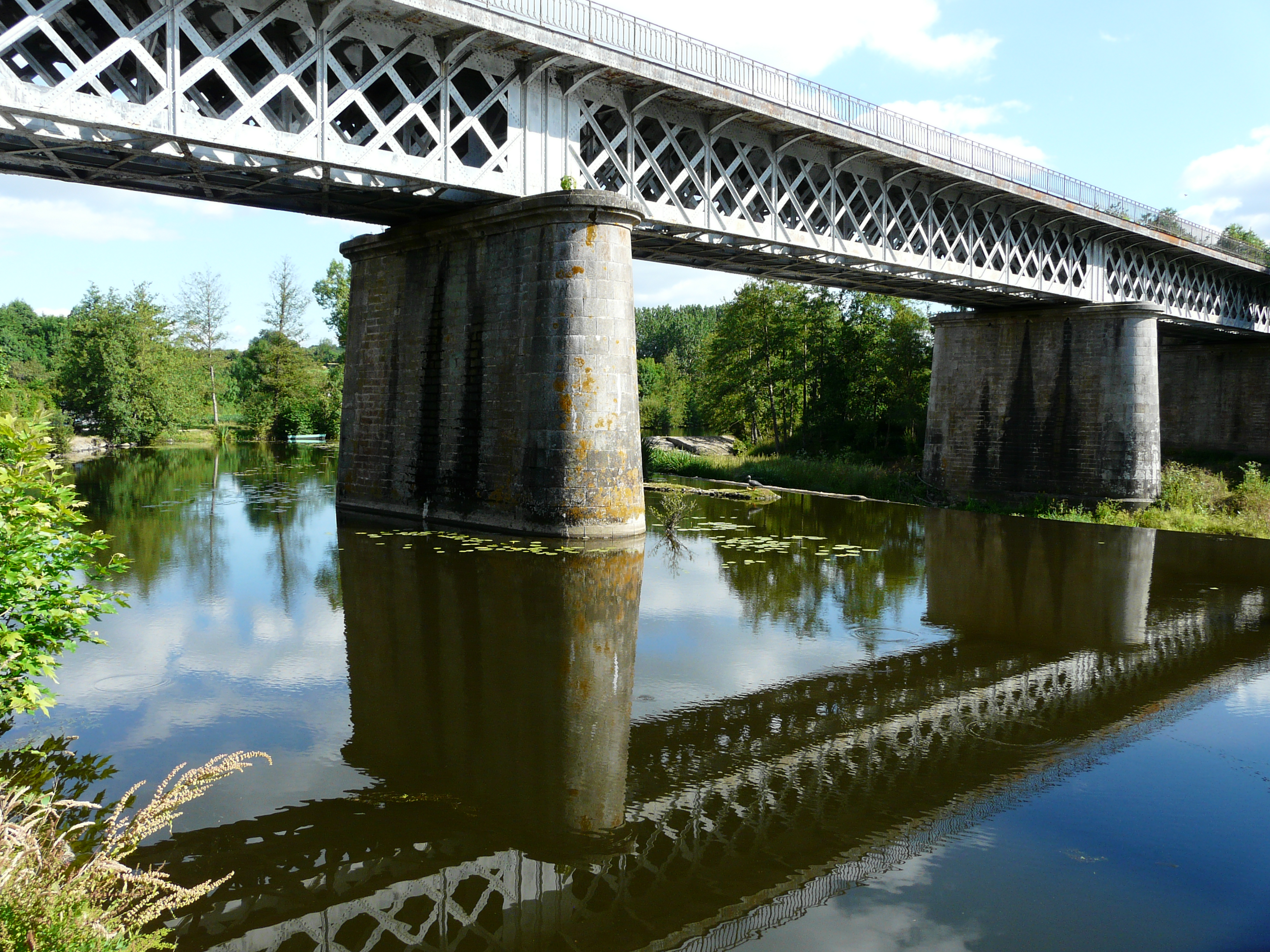 Le pont du chemin de fer sur le Thouet, Saint-Loup-sur-Thouet, Saint-Loup-Lamairé, Deux-Sèvres, France